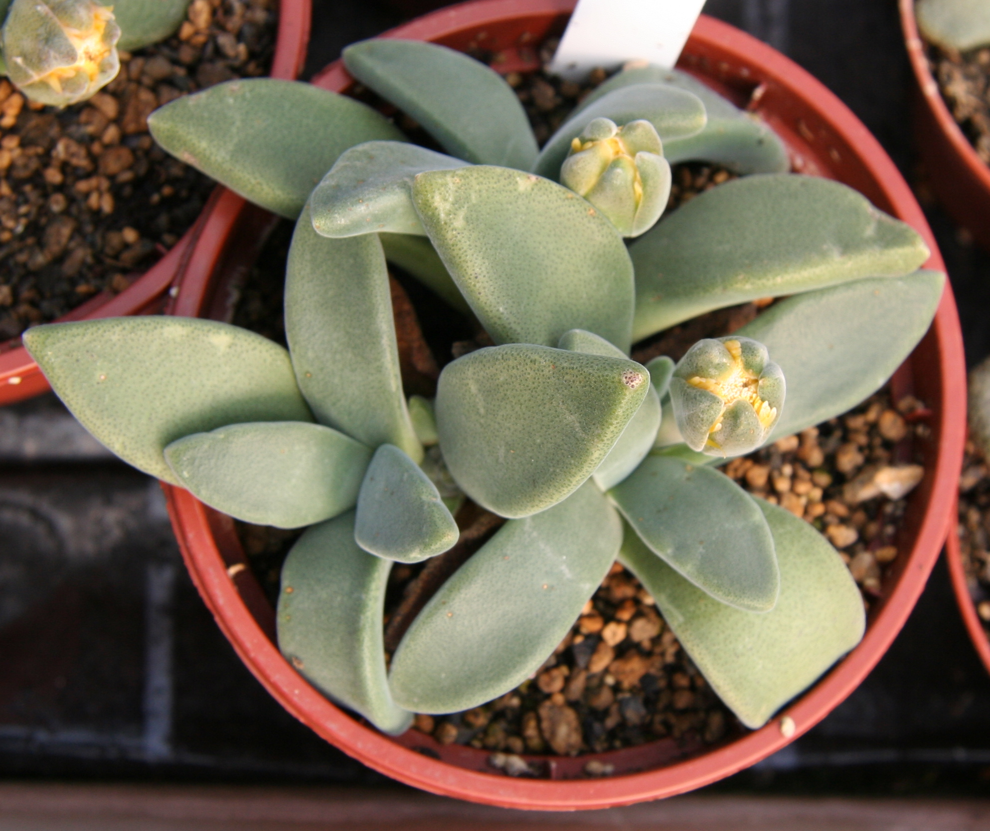 Aloinopsis peersii in Kultur bei Kakteen-Haage in Erfurt